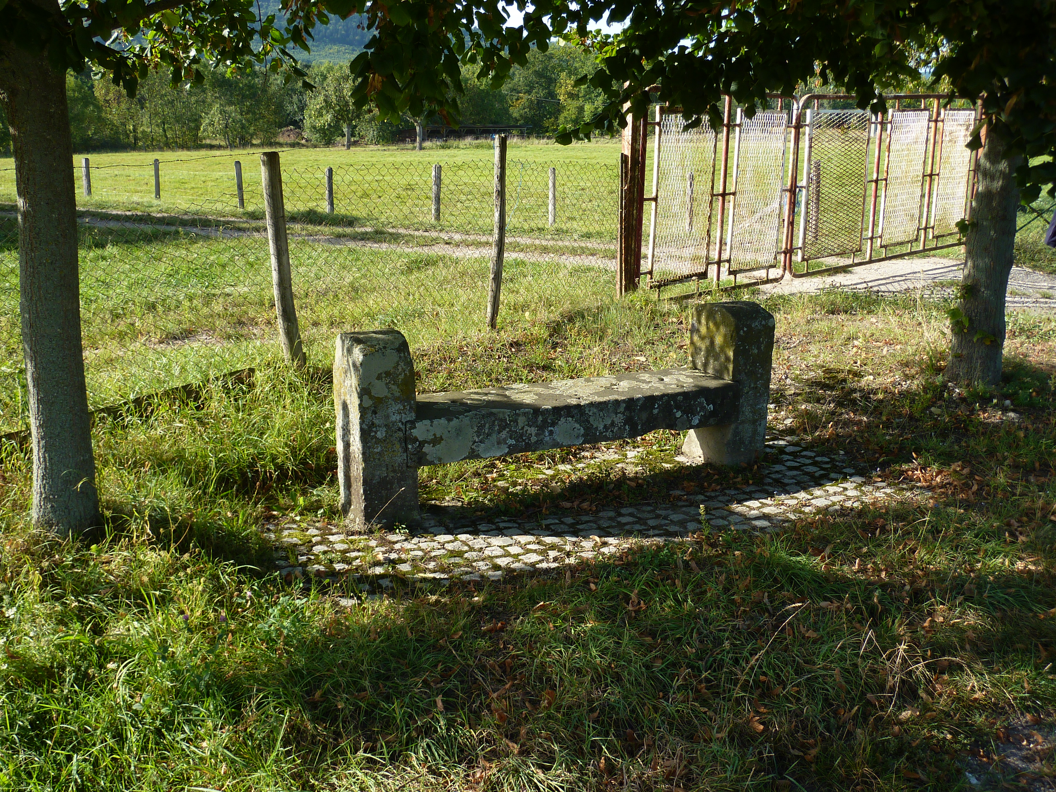 Steinerne Sitzbank bei Marmoutier